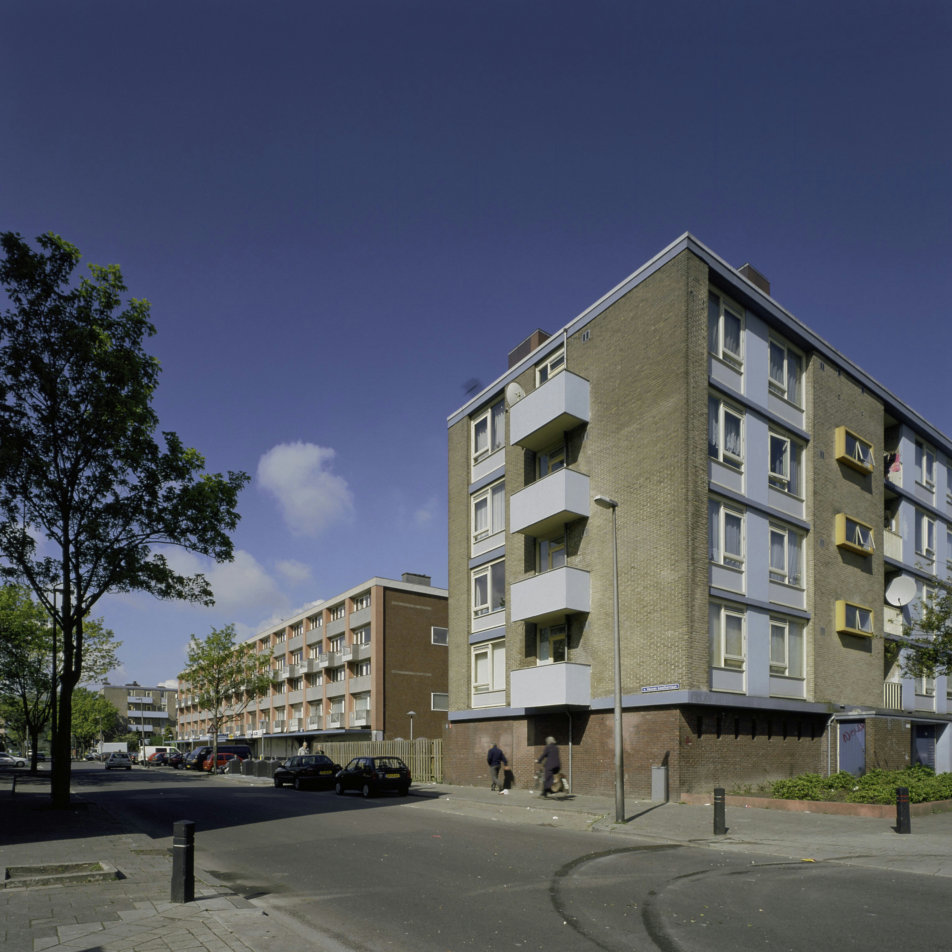 Woonwijk: Kanaleneiland: Overzicht met hoogbouw/flats (opmerking: Gefotografeerd voor Toonbeelden van de Wederopbouw)